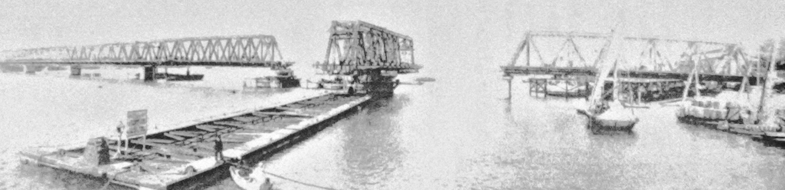 كوبري دسوق القديم أثناء العمل على بناؤه للمرة الثانية عام 1927